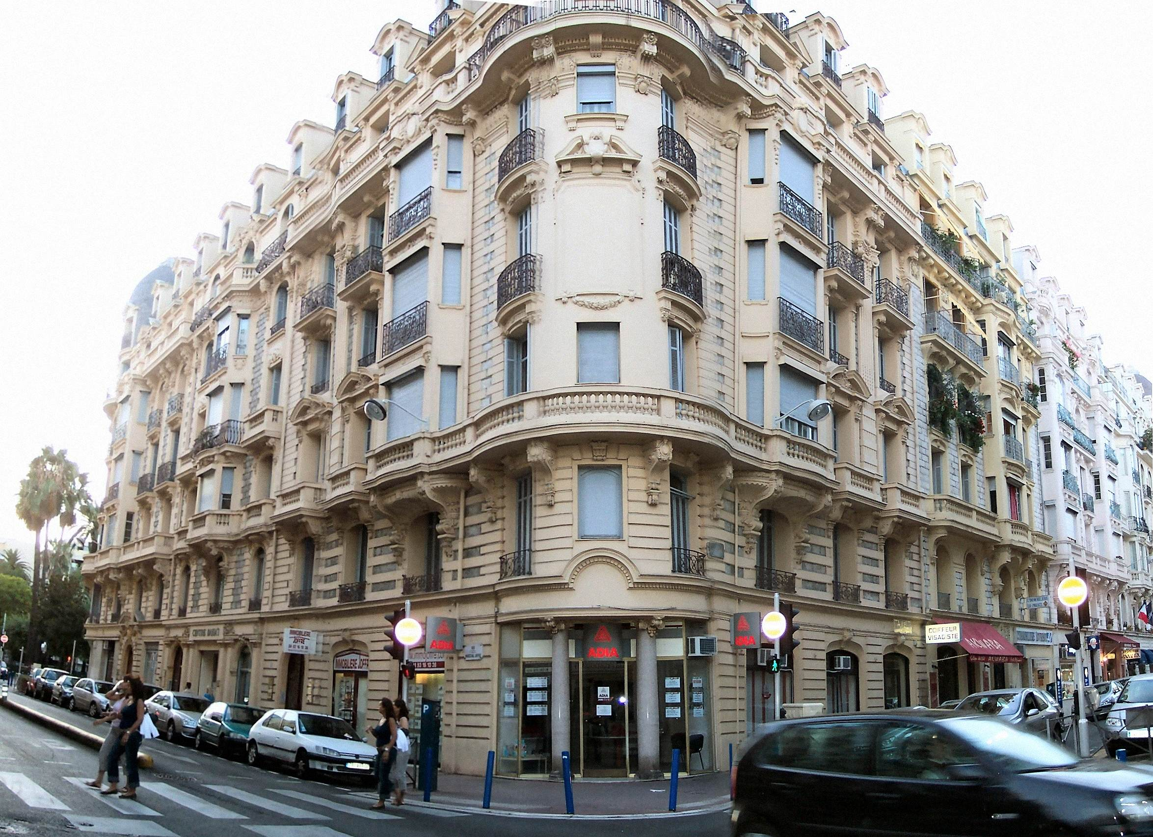 Nice - Quartier de la Vieille Ville - Photos génériques. Cet immeuble n'a pas l'appelation de palais mais peut justement être significatif de ce que cela signifiait dans les années 1900. Situation : Bd Maréchal Joffre, prise de vue ouest au couchant (19h30).